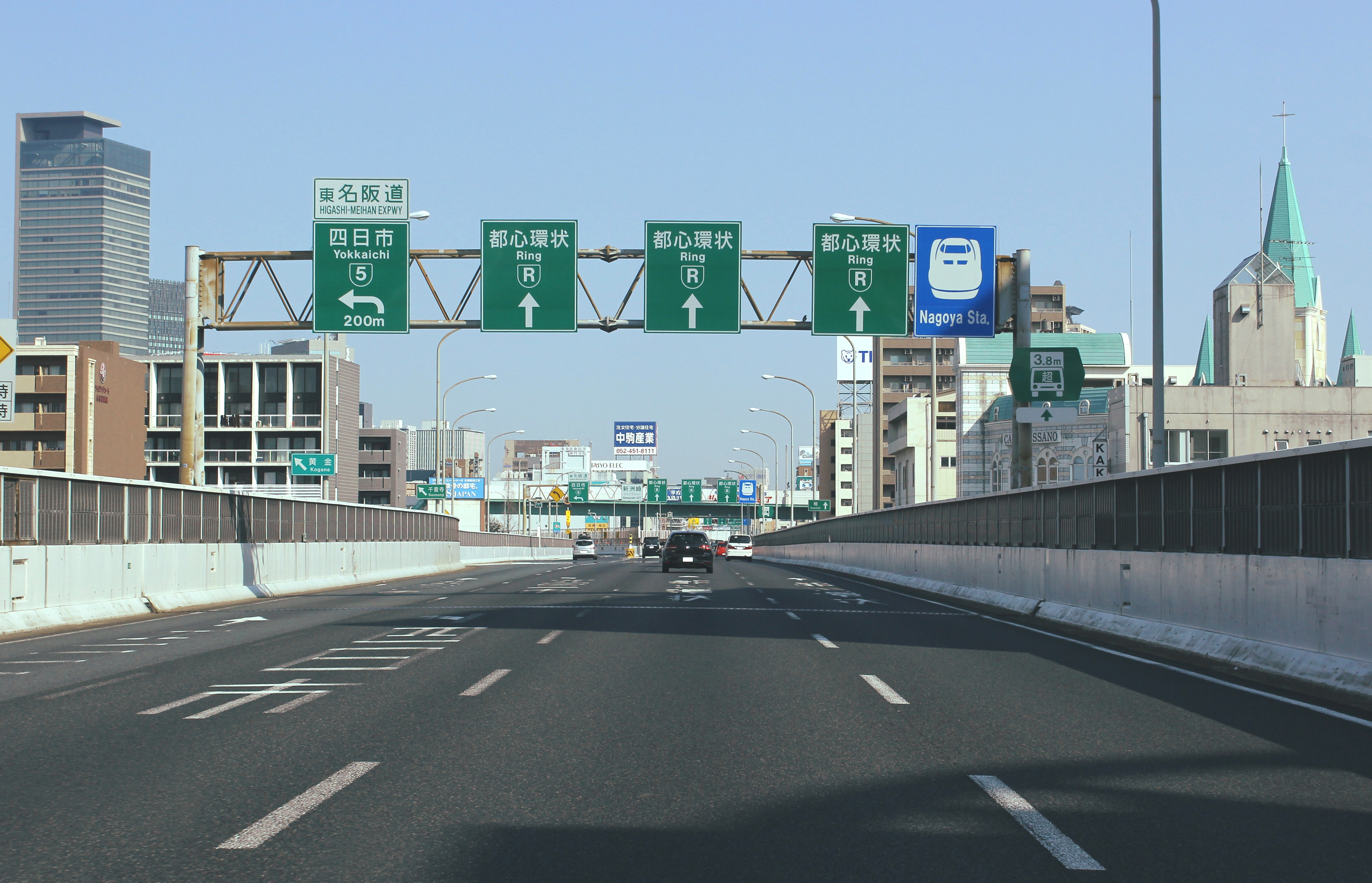 名古屋高速都心環状線 新洲崎JCT付近